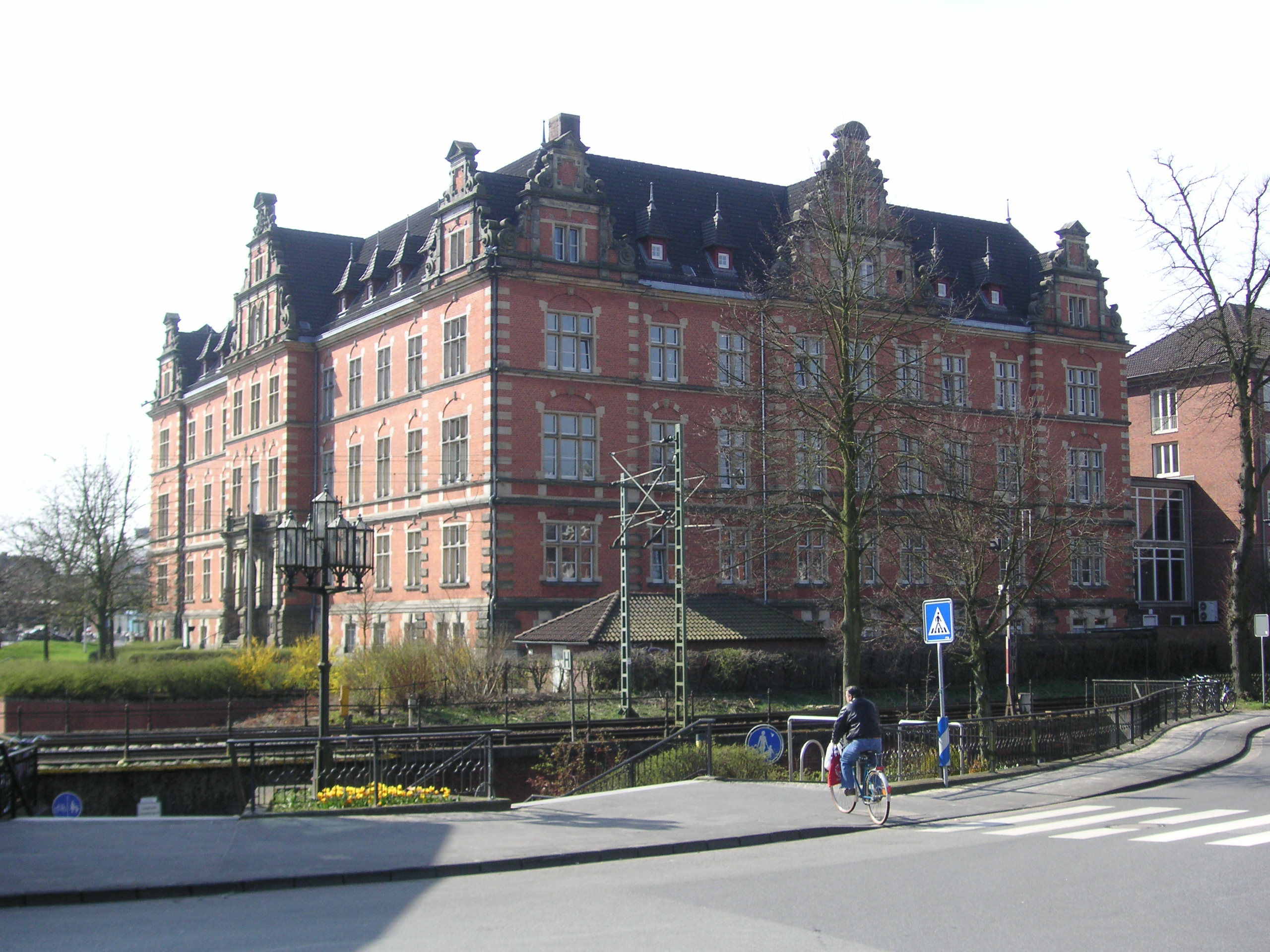 Die Regierung [2008/04] Stade war von 1885 bis 1978 Verwaltungssitz des gleichnamigem Regierungsbezirks. In diesem Gebäude, über dessen Eingang "Die Regierung" steht, befand sich die Verwaltung des Regierungsbezirks Stade. Auch heute befinden sich hier kommunale Einrichtungen. Wikipedia: Regierungsbezirk Stade